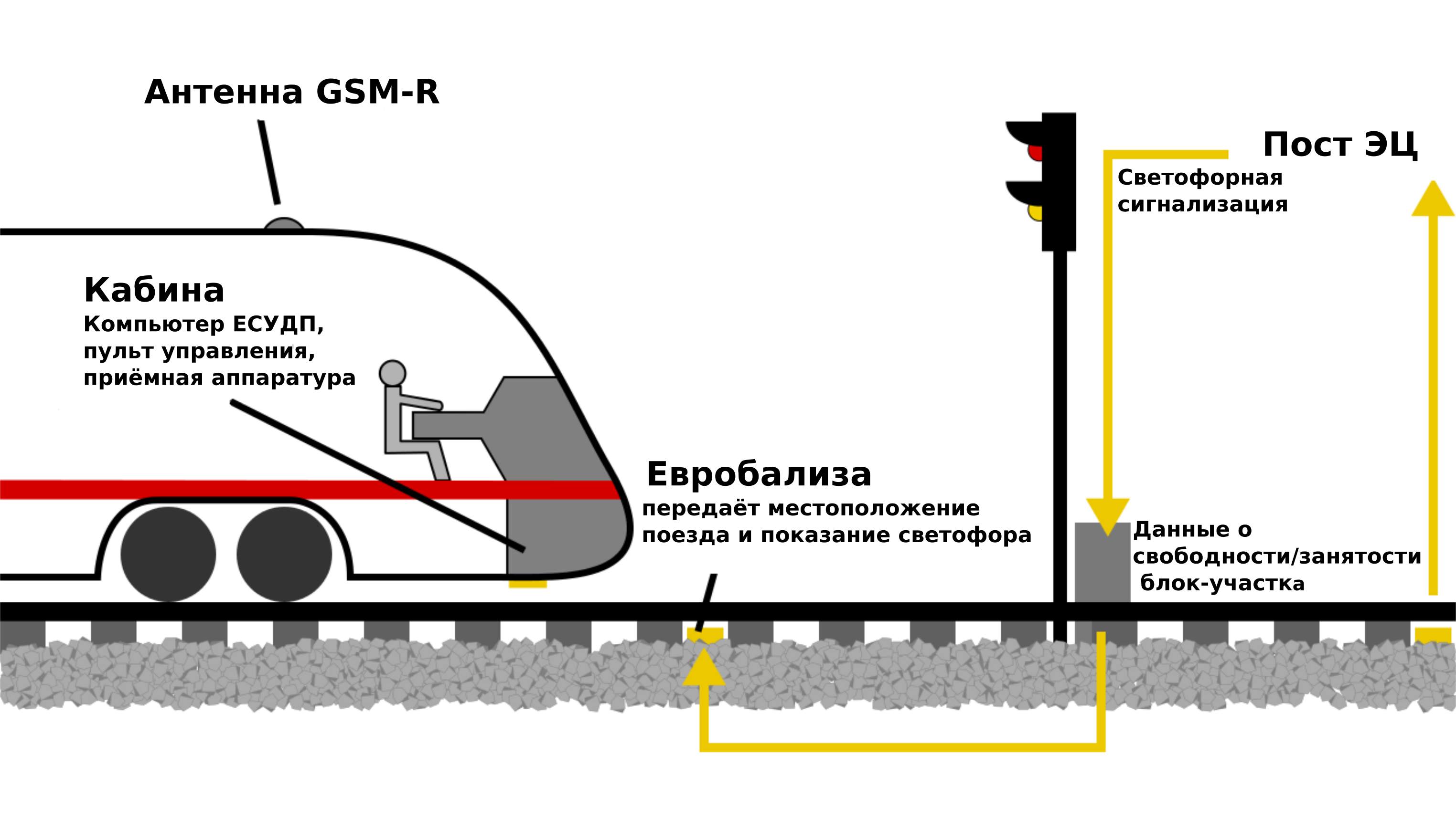 Схема работы Европейской системы управления движением поездов первого уровня